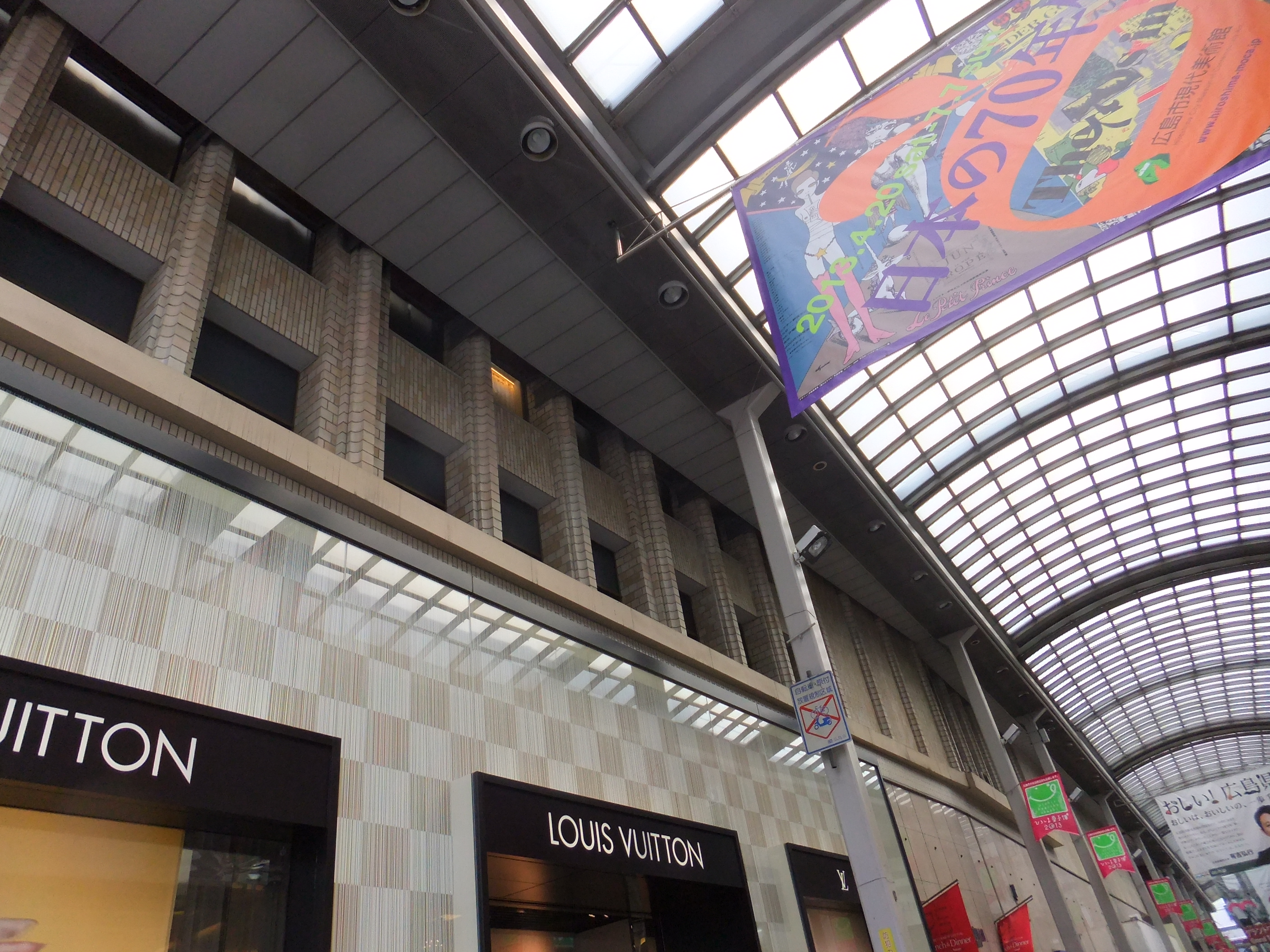 福屋八丁堀本店